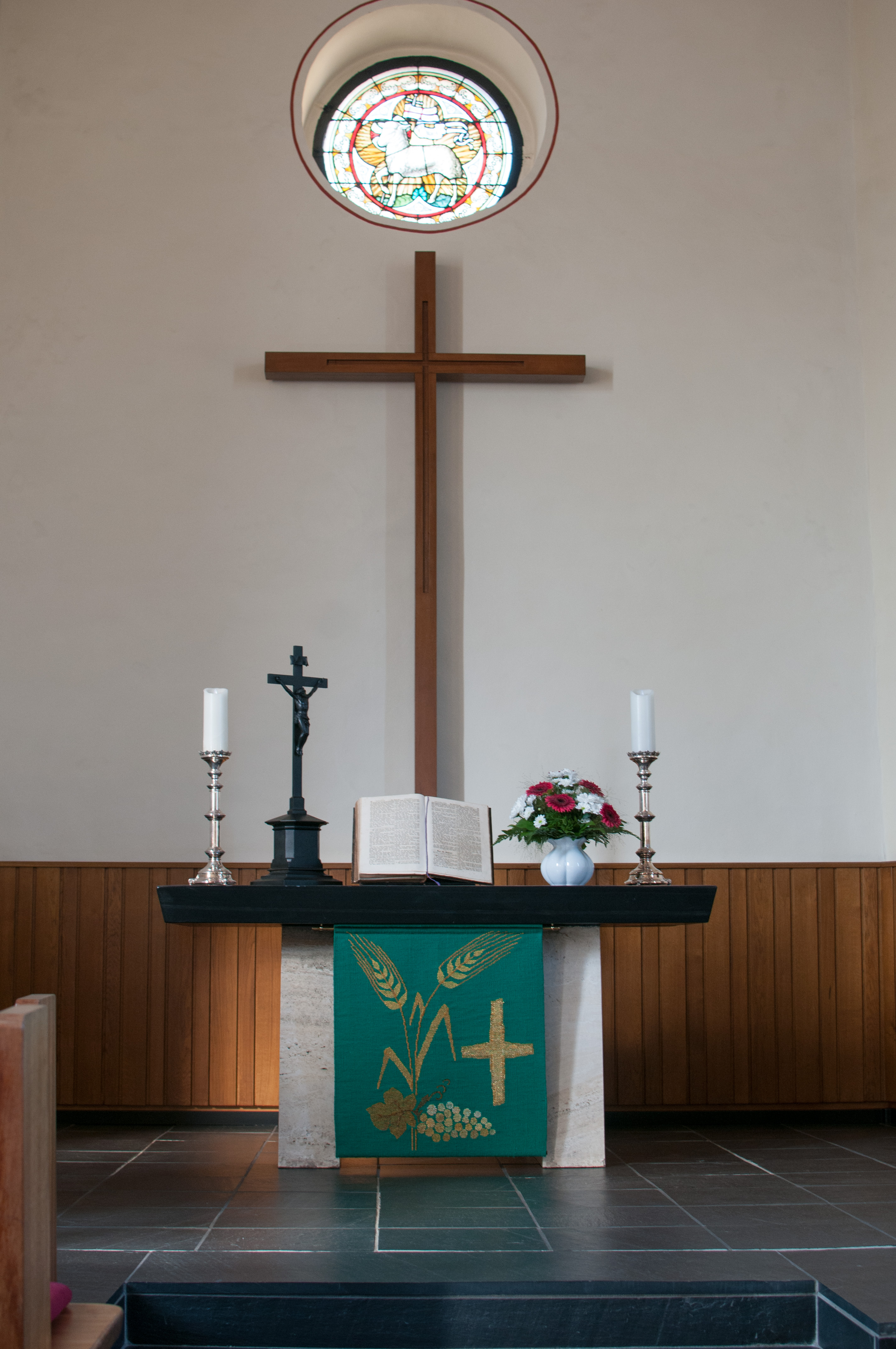 Medebach, evangelische Kirche, Altardarstellung